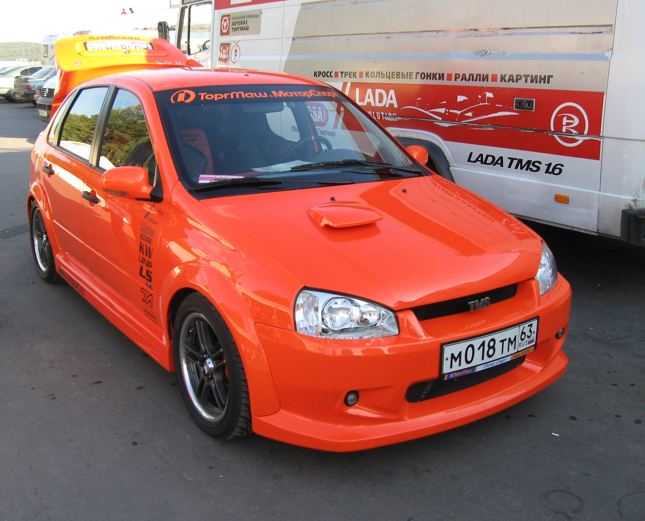 kalina tms (torgmash tuning)